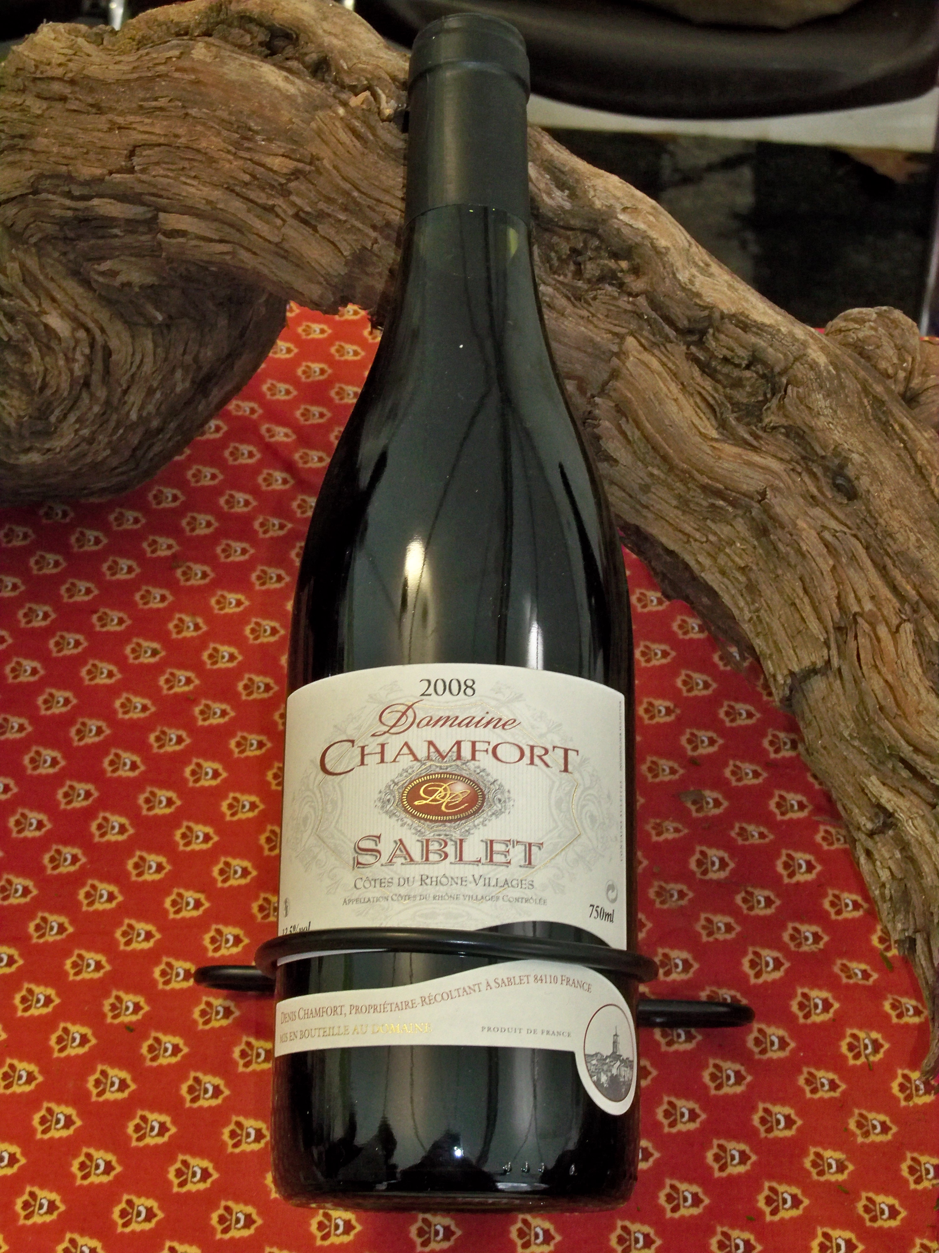 bouteille de Sablet AOC